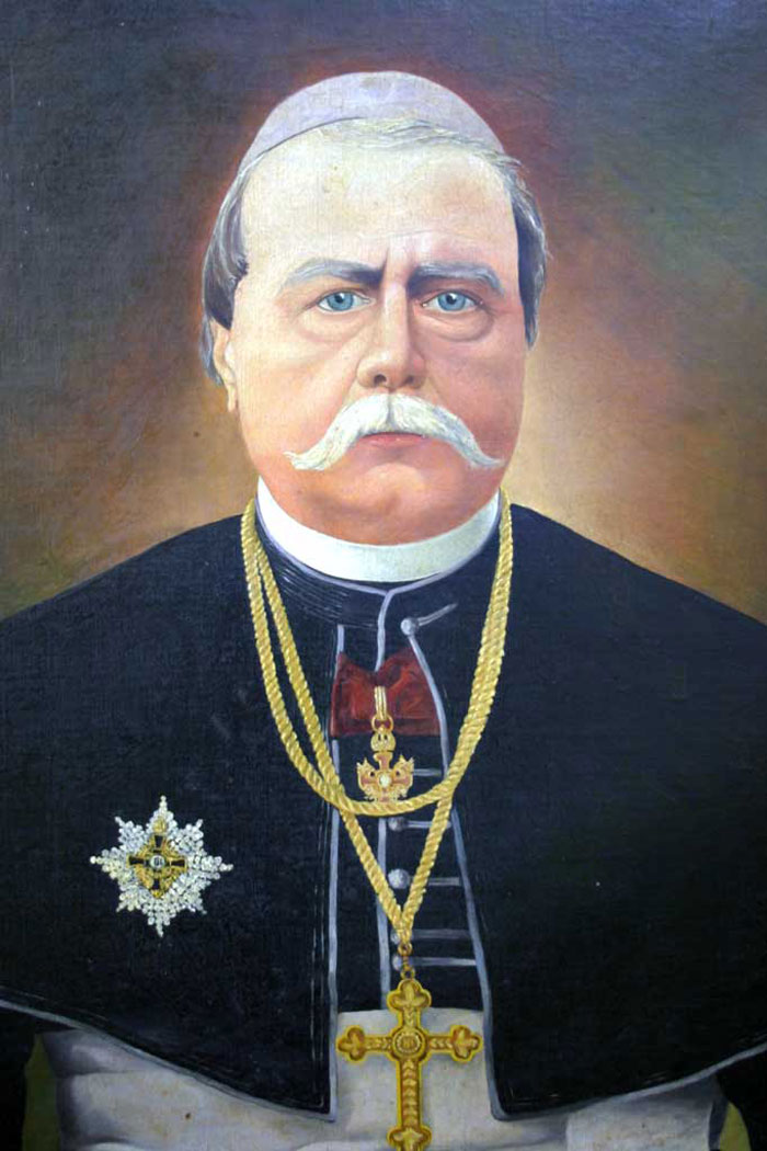 Marijan Marković (1840-1912) Apostolischer Administrator in Banja Luka 1884 bis 1912 Ölbild um 1910